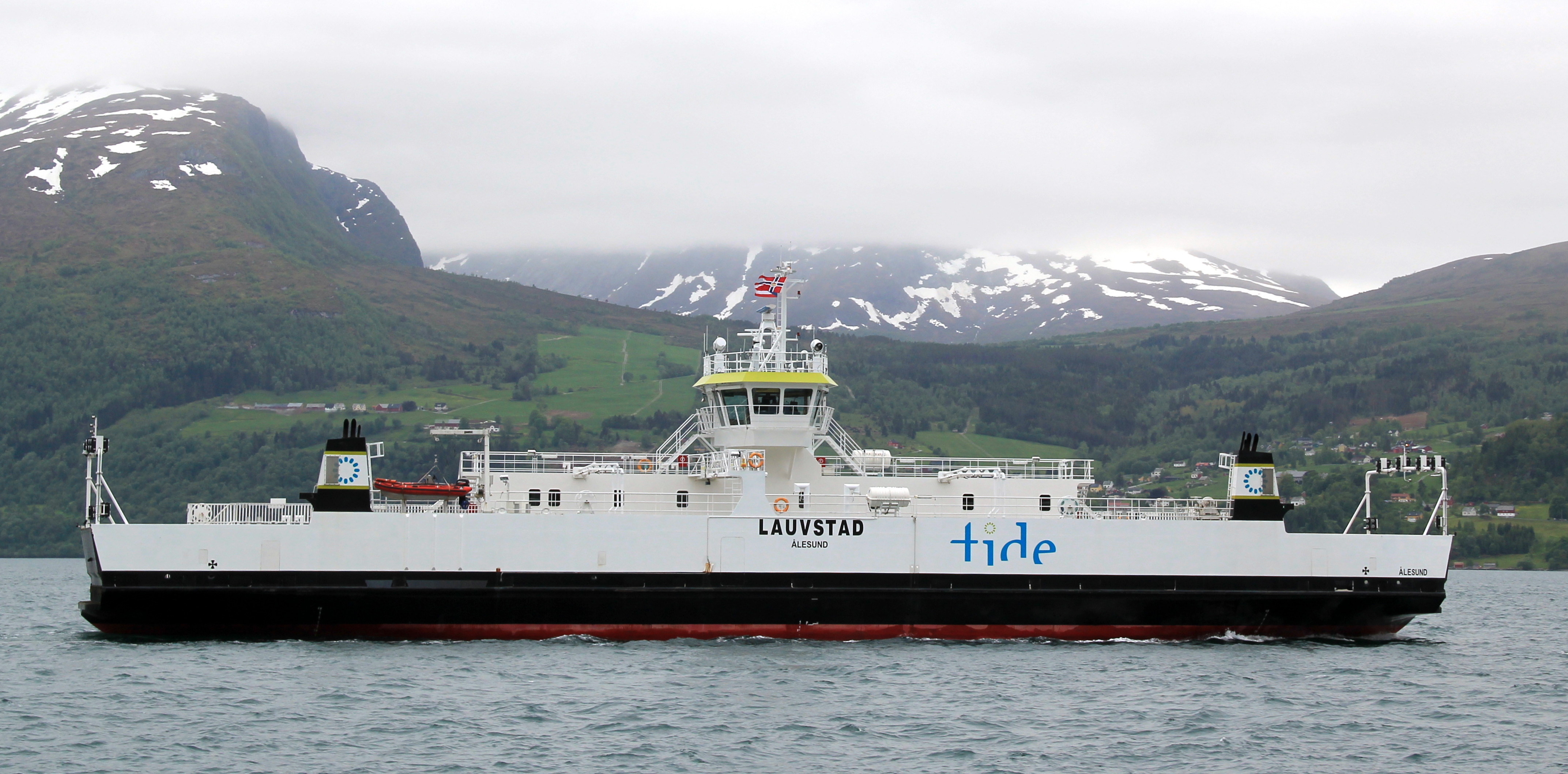 MF «Lauvstad», June 2012